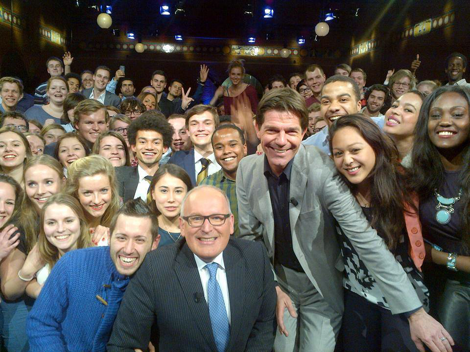 Minister Timmermans was dinsdag 11 maart 2014 in de Beurs van Berlage te gast bij College Tour van Twan Huys. De minister werd door Huys en 500 studenten aan de tand gevoeld over zijn jeugd, zijn drijfveren en politieke actualiteiten, waaronder Oekraïne en Syrië. Uit de 2,5 uur opnamen maakte de NTR een uitzending van 50 minuten, die vrijdag 14 maart op Nederland 3 werd uitgezonden.